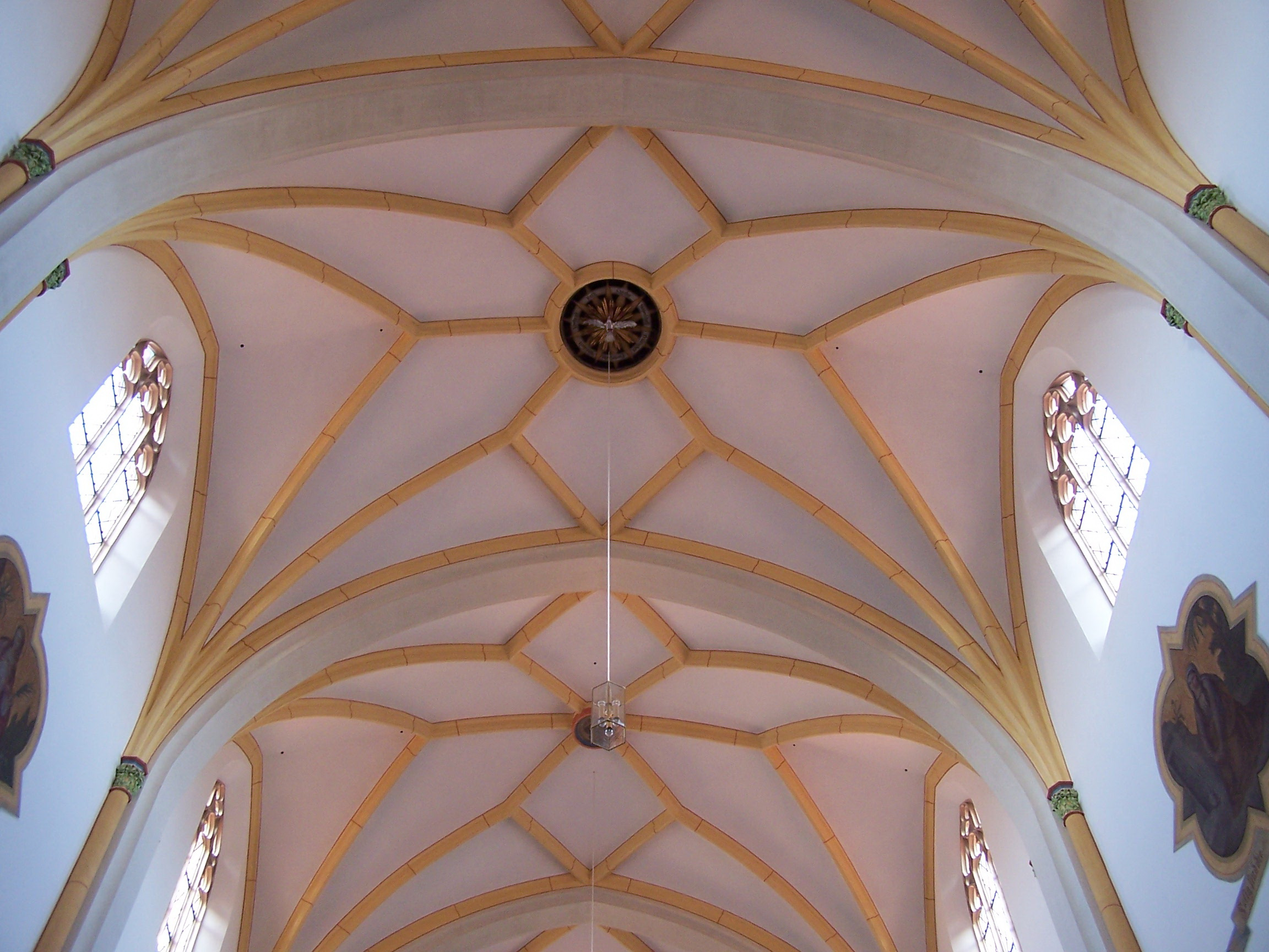 Pfeffenhausen, Kirchplatz 16. Katholische Pfarrkirche St. Martin. Neugotische Basilika, Blankziegelbau, nach Planung des königlichen Baumamtmanns Anton Völkl, 1885-87. Netzgewölbe in Chor und Langhaus.